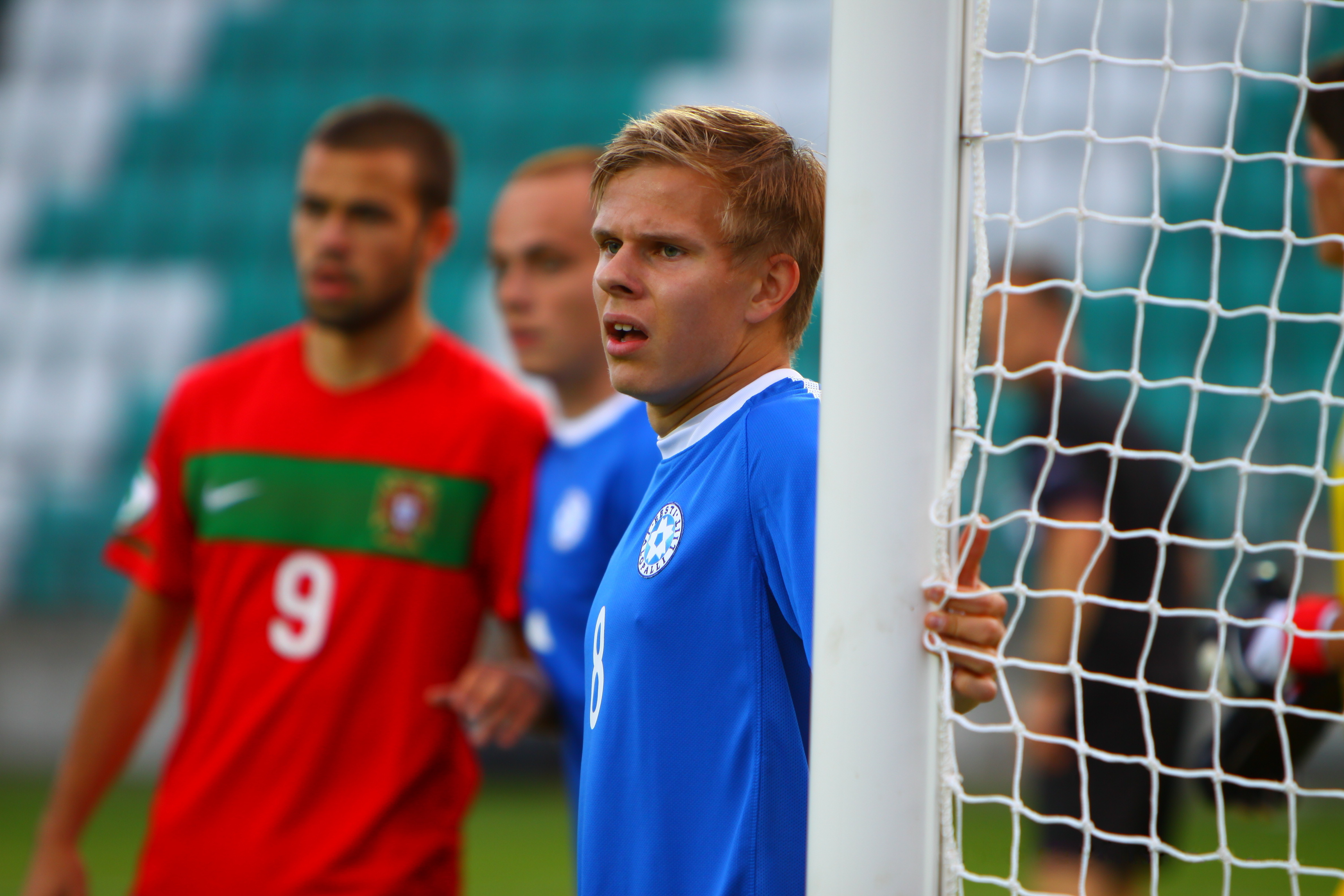 Andreas Raudsepp